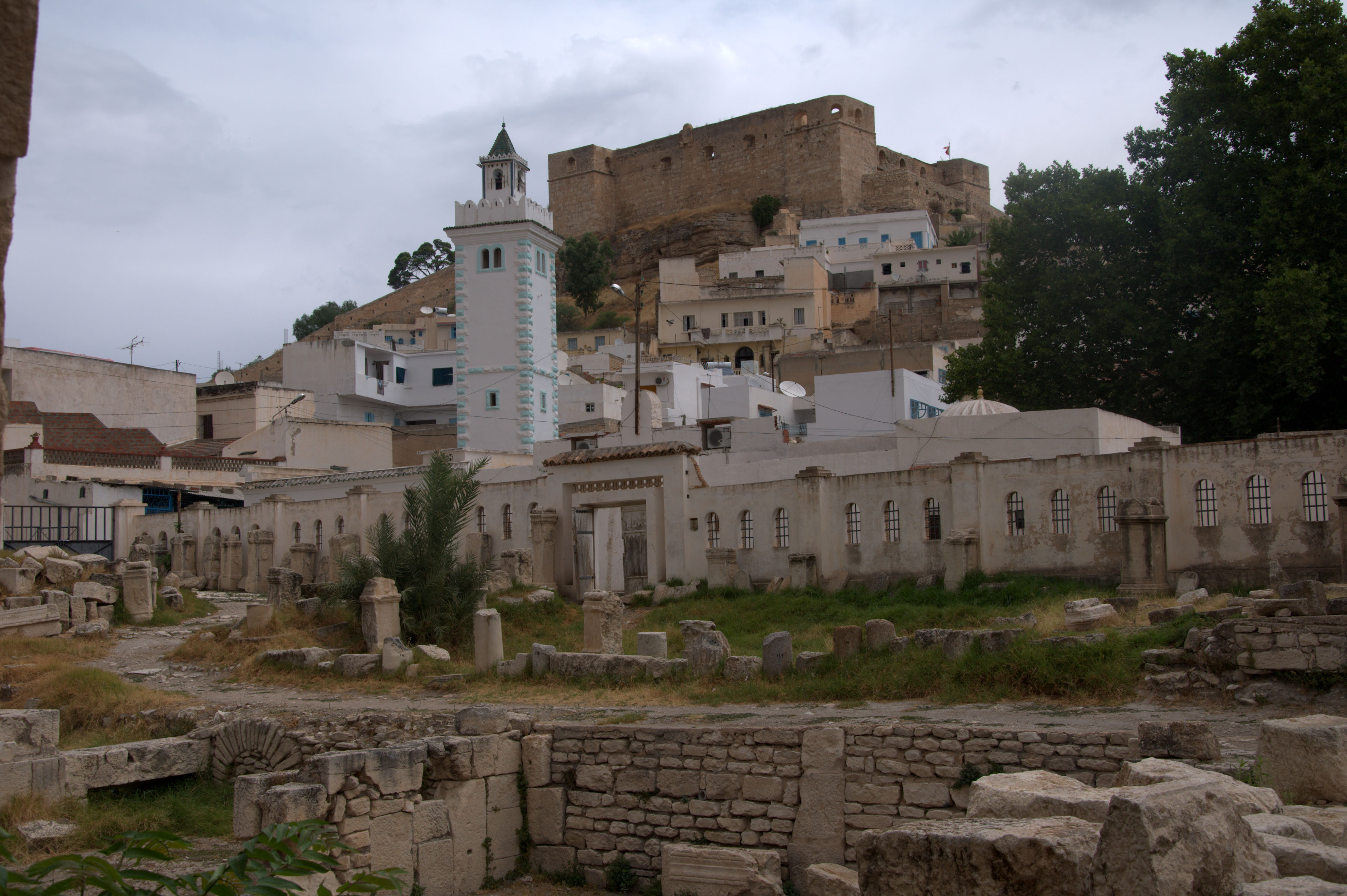 Thermes romains, mosquée et kasbah du Kef (Tunisie)